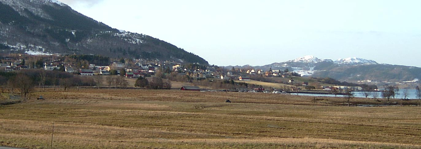 Eide in Møre og Romsdal, Norway.